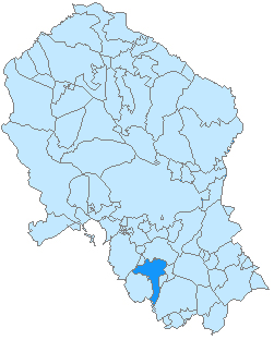 Mapa de Aguilar de la Frontera en la provincia de Córdoba, Andalucía, España.